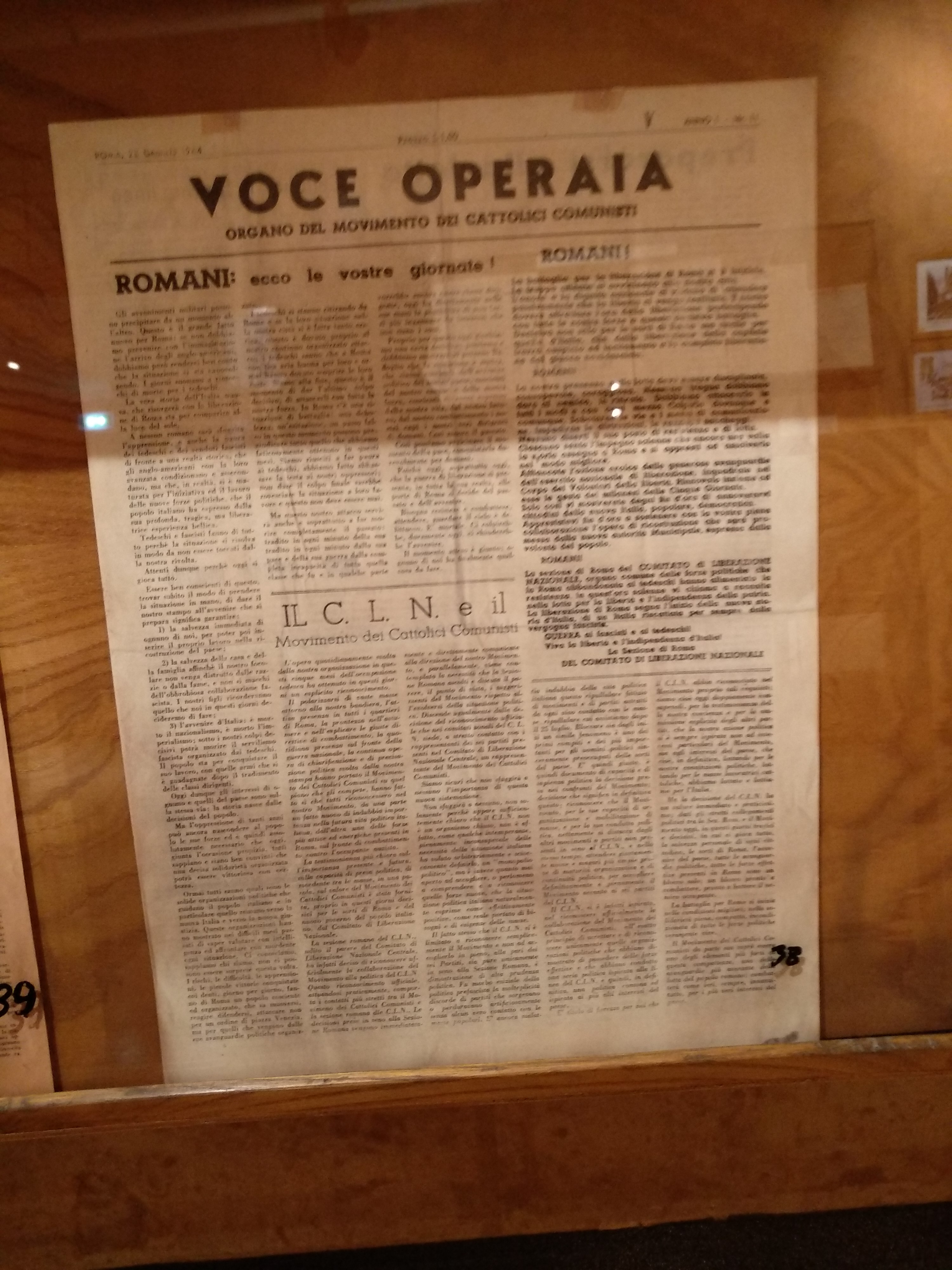 Voce Operaia giornale clandestino durante l'occupazione tedesca